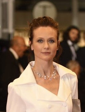 Sabine Crossen lors du 72ème Festival International du Film de Cannes 2019 (recadrée).